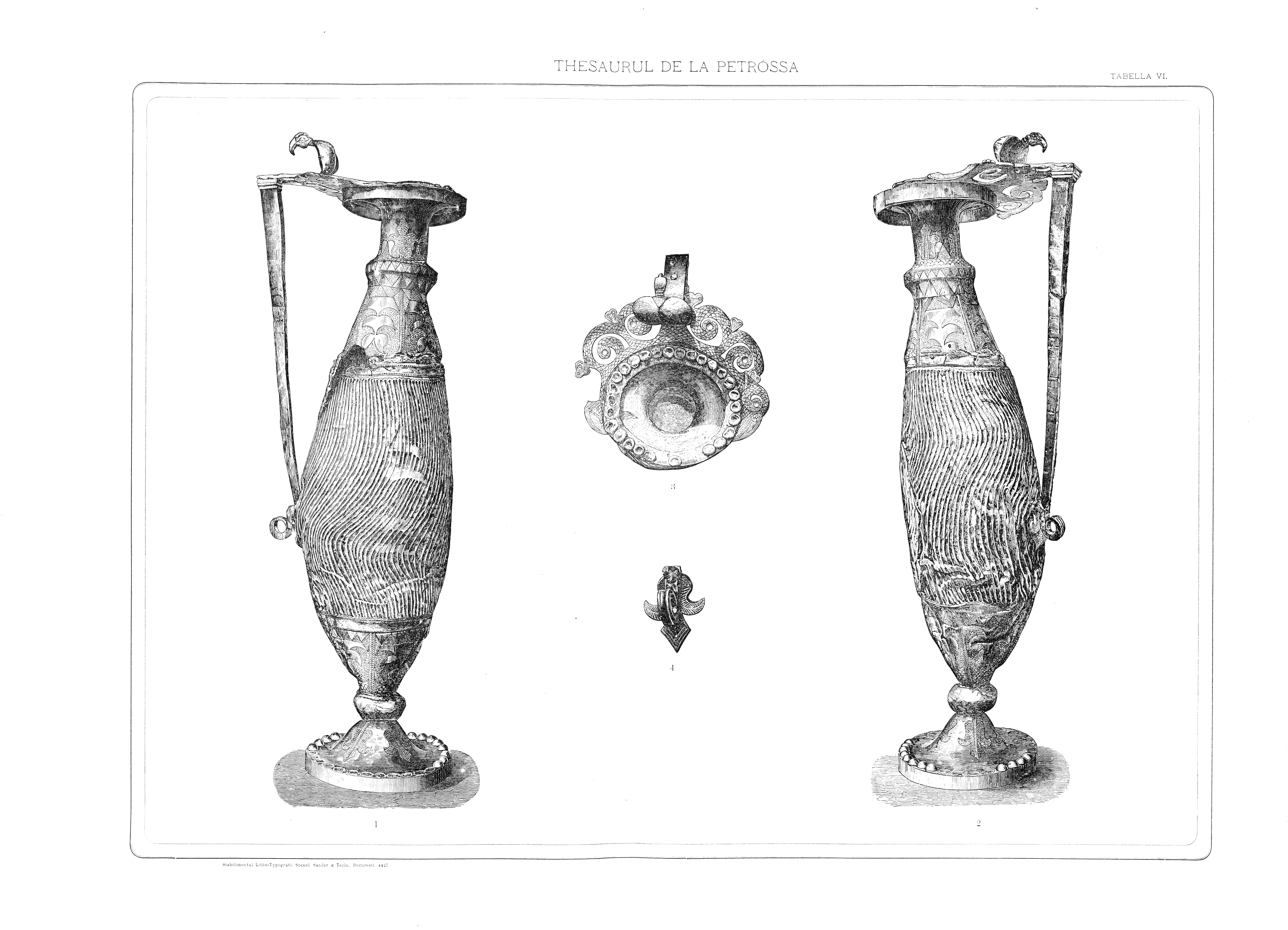 Ibricul, vas cu un singur mâner, în vechime: cenochoes. Înălțimea 36 centimetri, diametrul maxim 10, greutatea 1 kil. 7155.